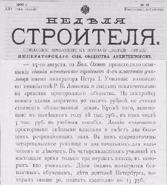 Копия фрагмента страницы Неделя строителя 1900 год №37 приложение к журналу Зодчий